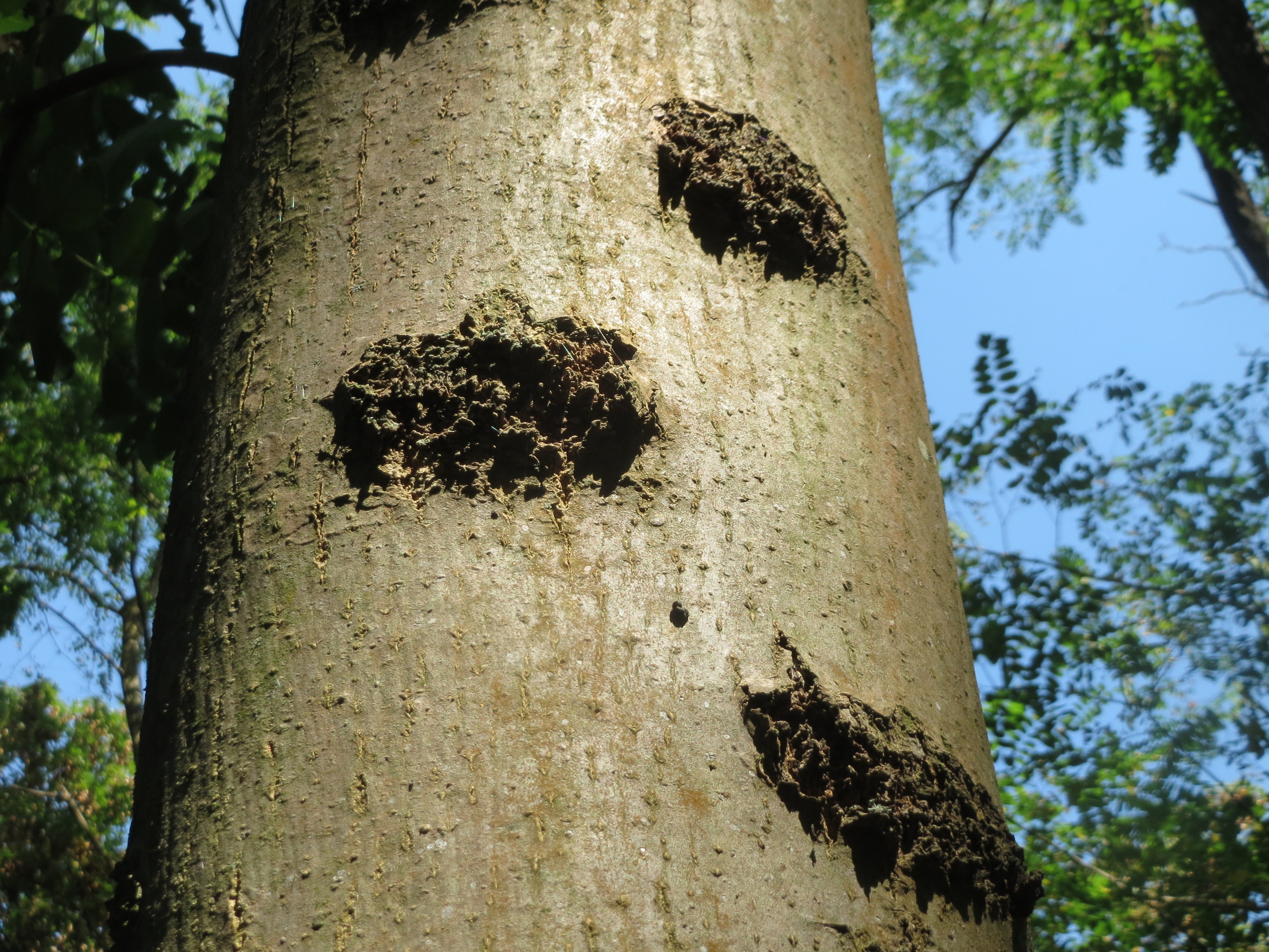 Rinde einer Esche (Fraxinus excelsior) im Schwetzinger Hardt